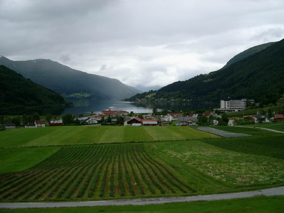 Loen Norwegen